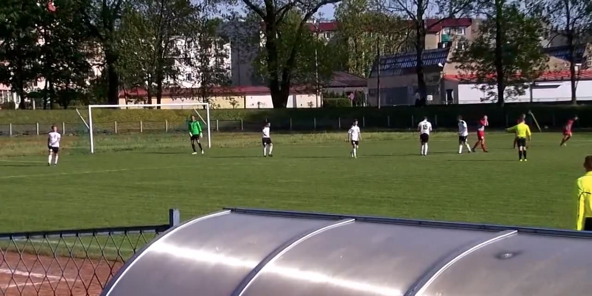 Mecz piłkarski Pogoni Prudnik z LZS Racławiczki rozegrany 5 maja 2018.